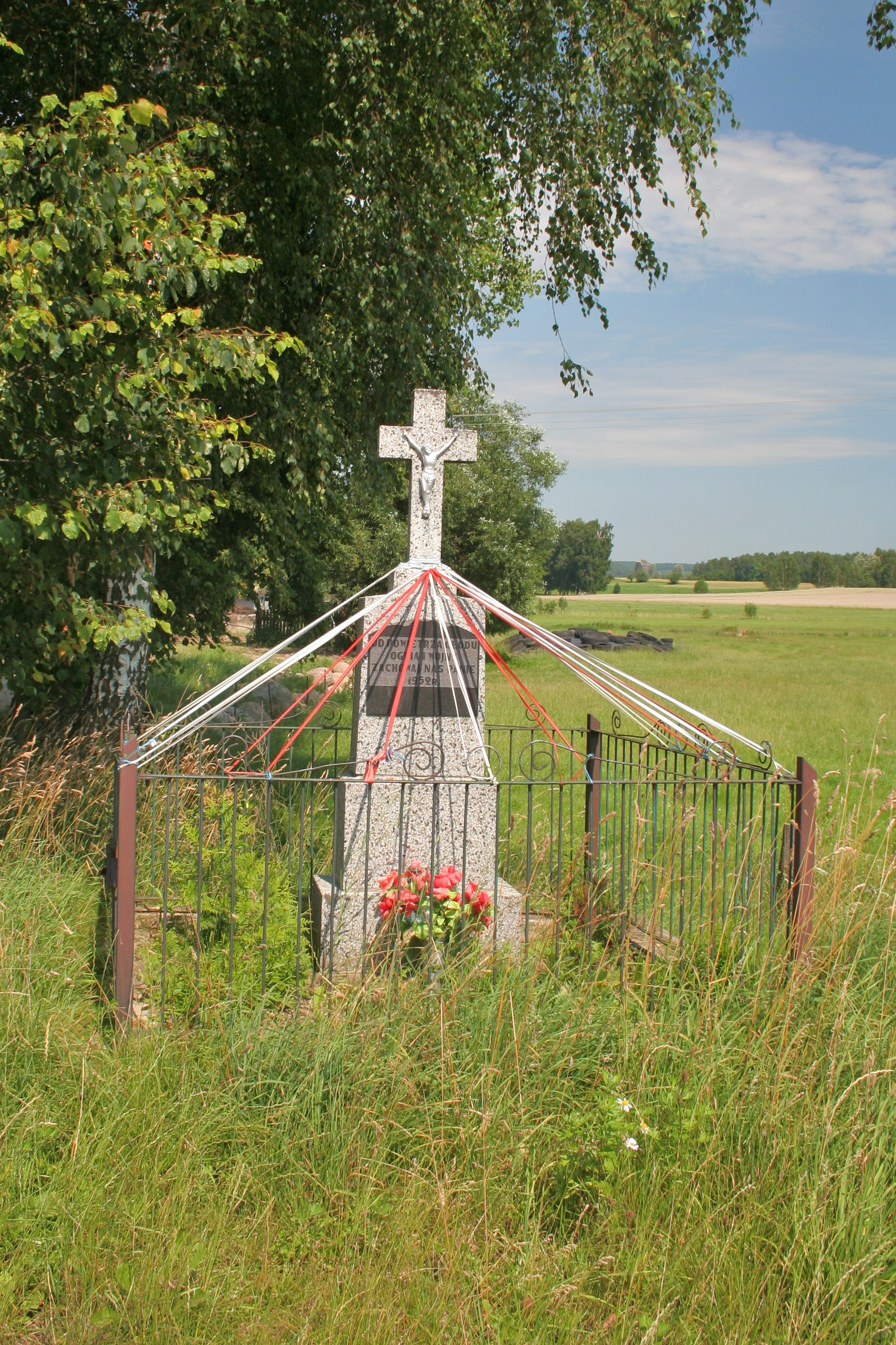 Krzyż przydrożny we wsi Szczęsnowicze.